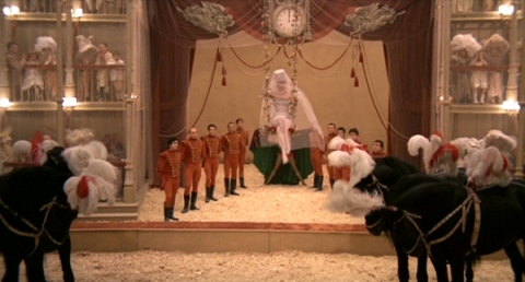 Képkocka a „Júlia és a szellemek” című filmből